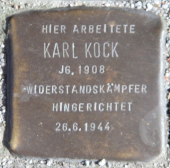 bild des stolpersteins